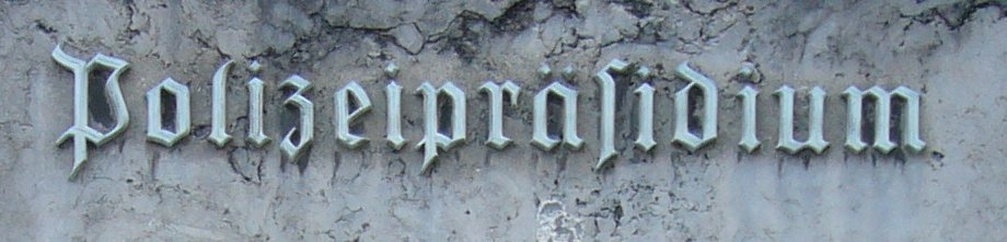 Sign “Polizeipräsidium” (Löwengrube).